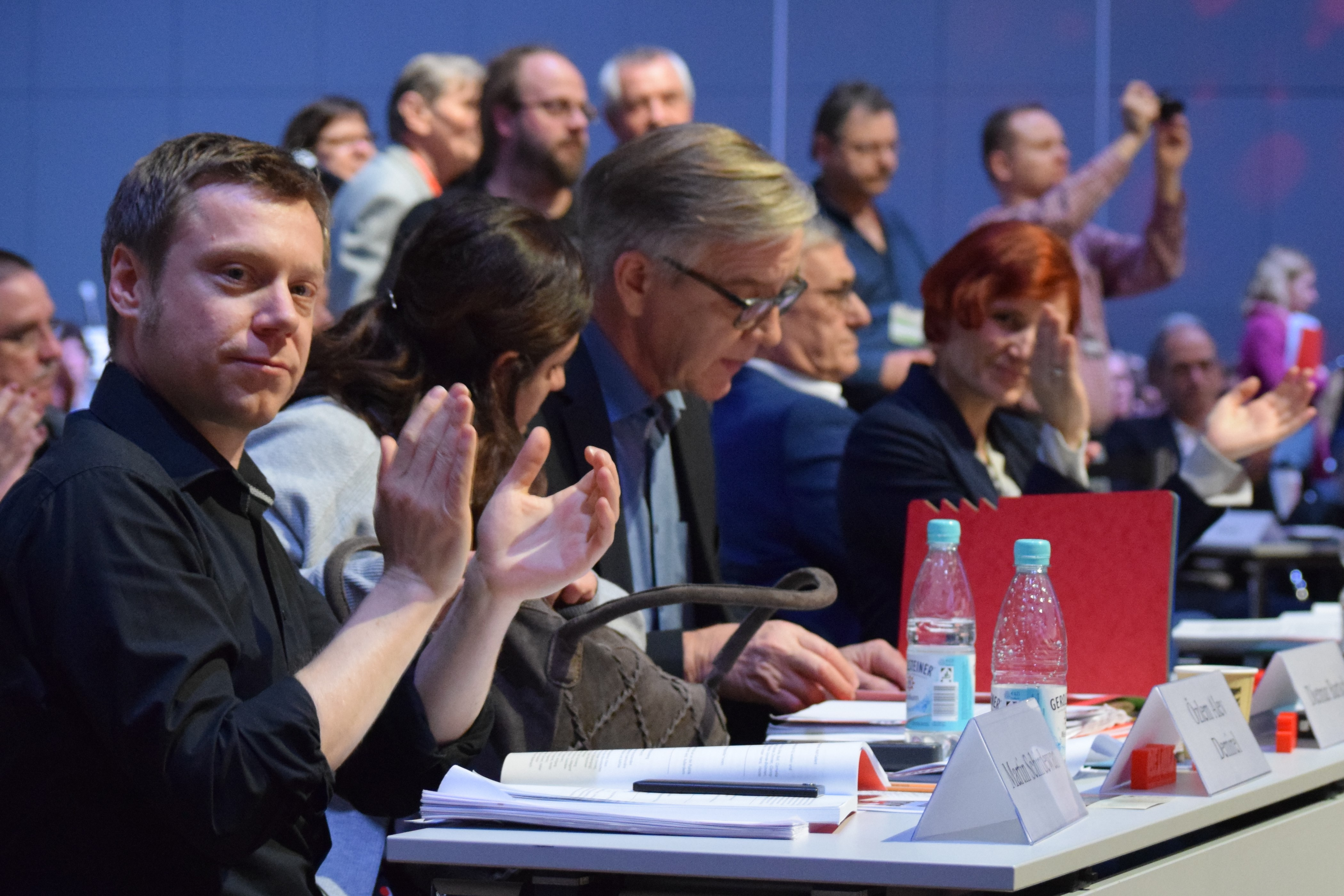 Der Spitzenkandidat Martin Schirdewan auf dem Parteitag der Linkspartei in Bonn. 2. Tagung des 6. Parteitages der Partei DIE LINKE, 22. und 23. Februar 2019, Bonn.